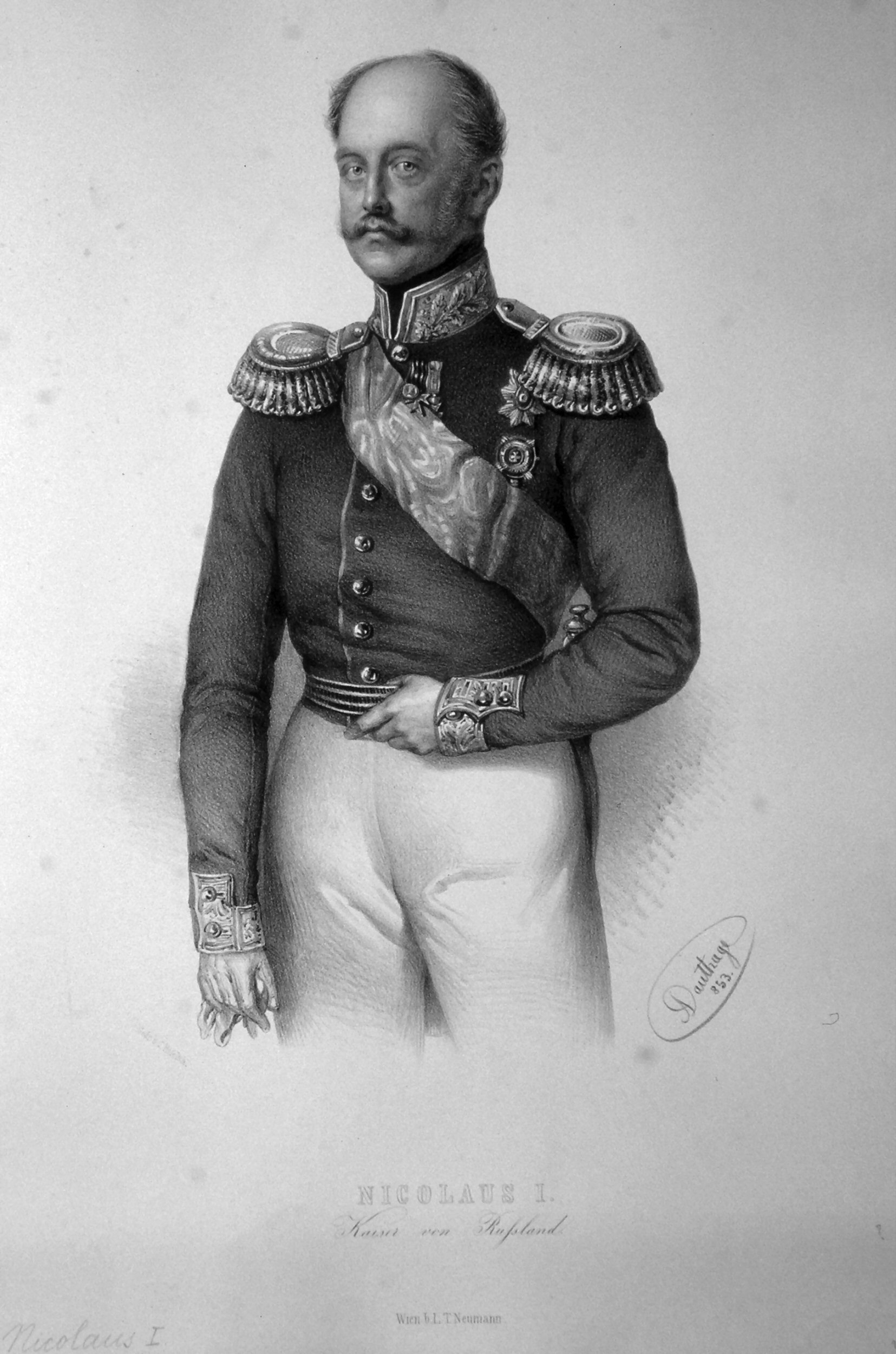 Nikolaus I. (1798.1855), Kaiser von Russland, König von Polen. Lithographie von Adolf Dauthage, 1853